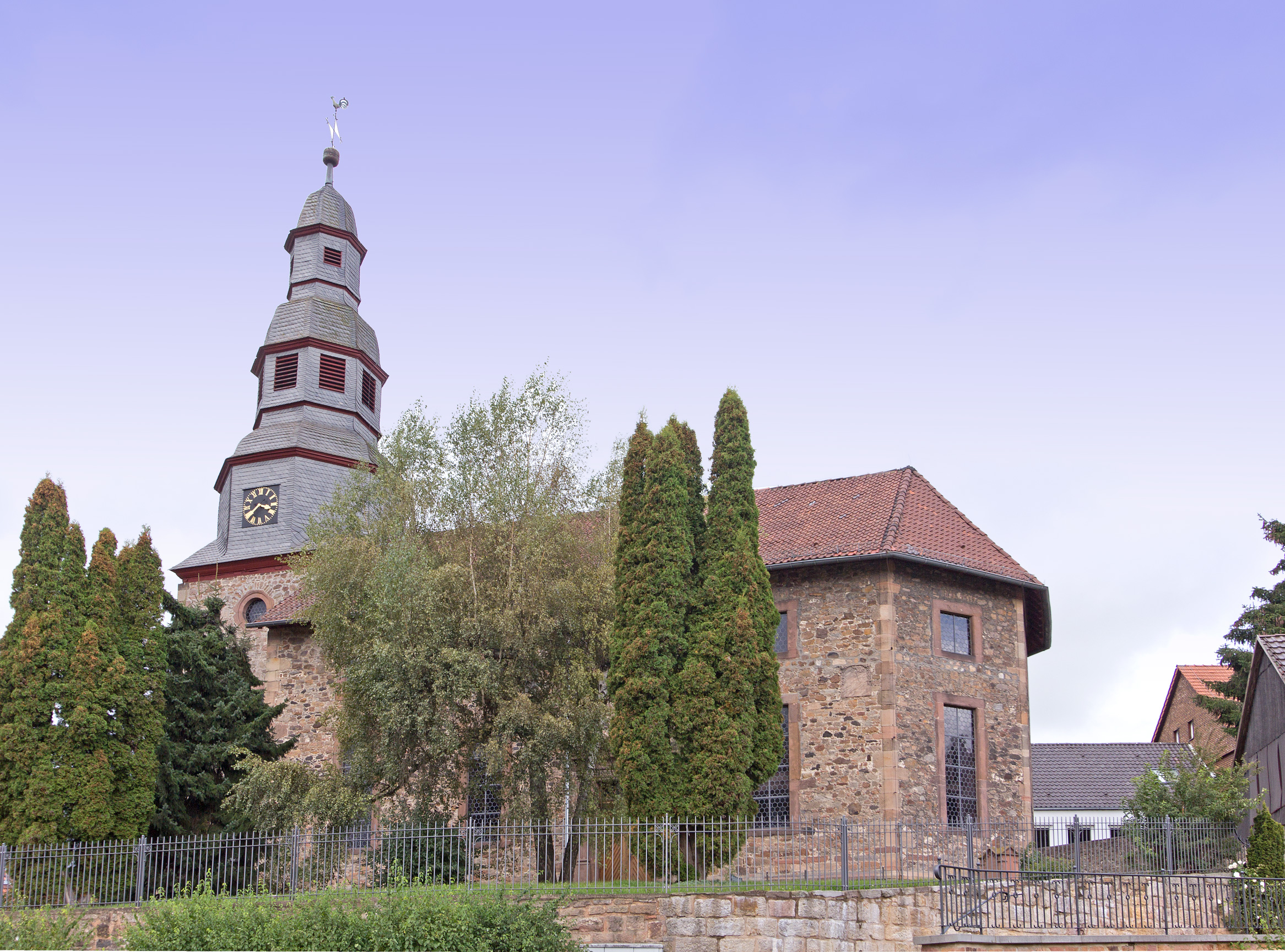 Stadtkirche in Kirtorf im Vogelsberg.